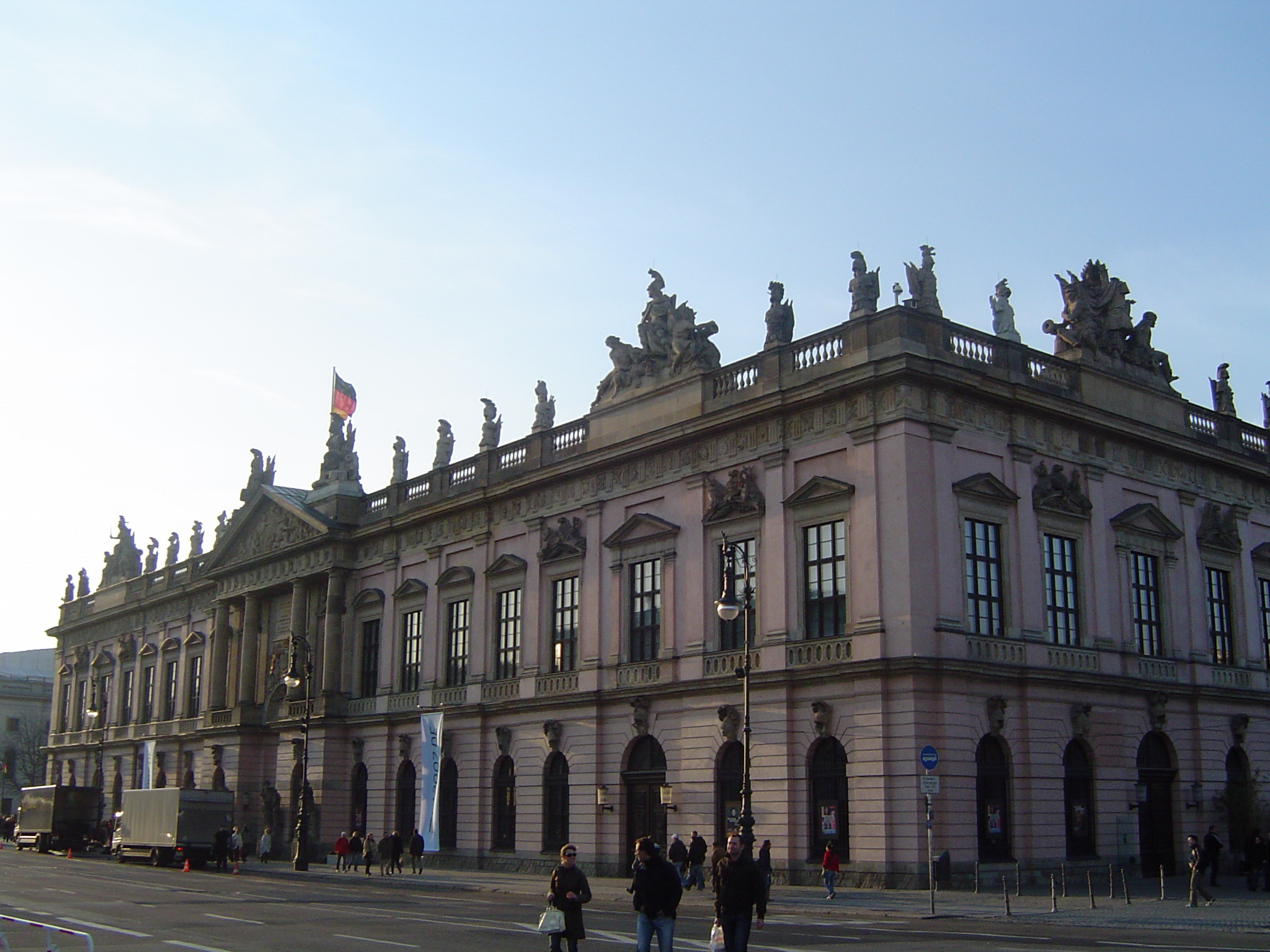 Zeughaus Berlin